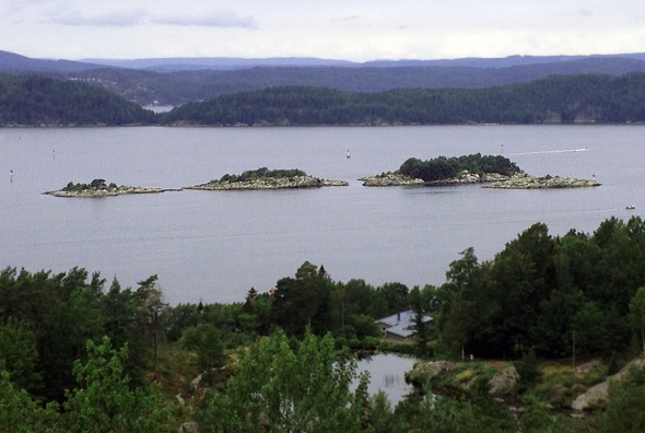 Askholmene i Oslofjorden sett fra sørvest.